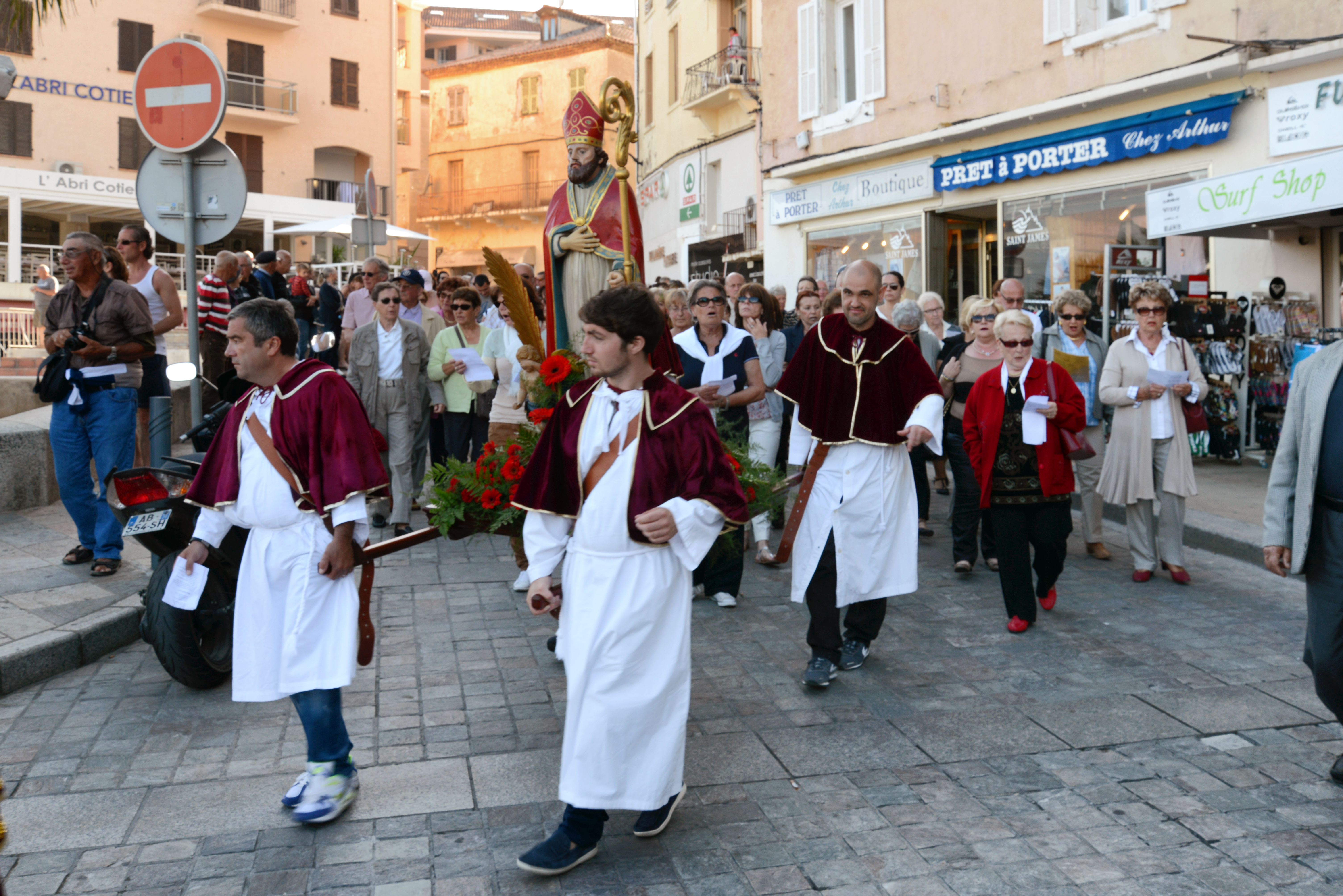 Calvi, Balagne (Haute-Corse) - Procession annuelle de la Saint-Érasme, patron des pêcheurs et gens de mer, ici descendant sur le port de plaisance Xavier Colonna.